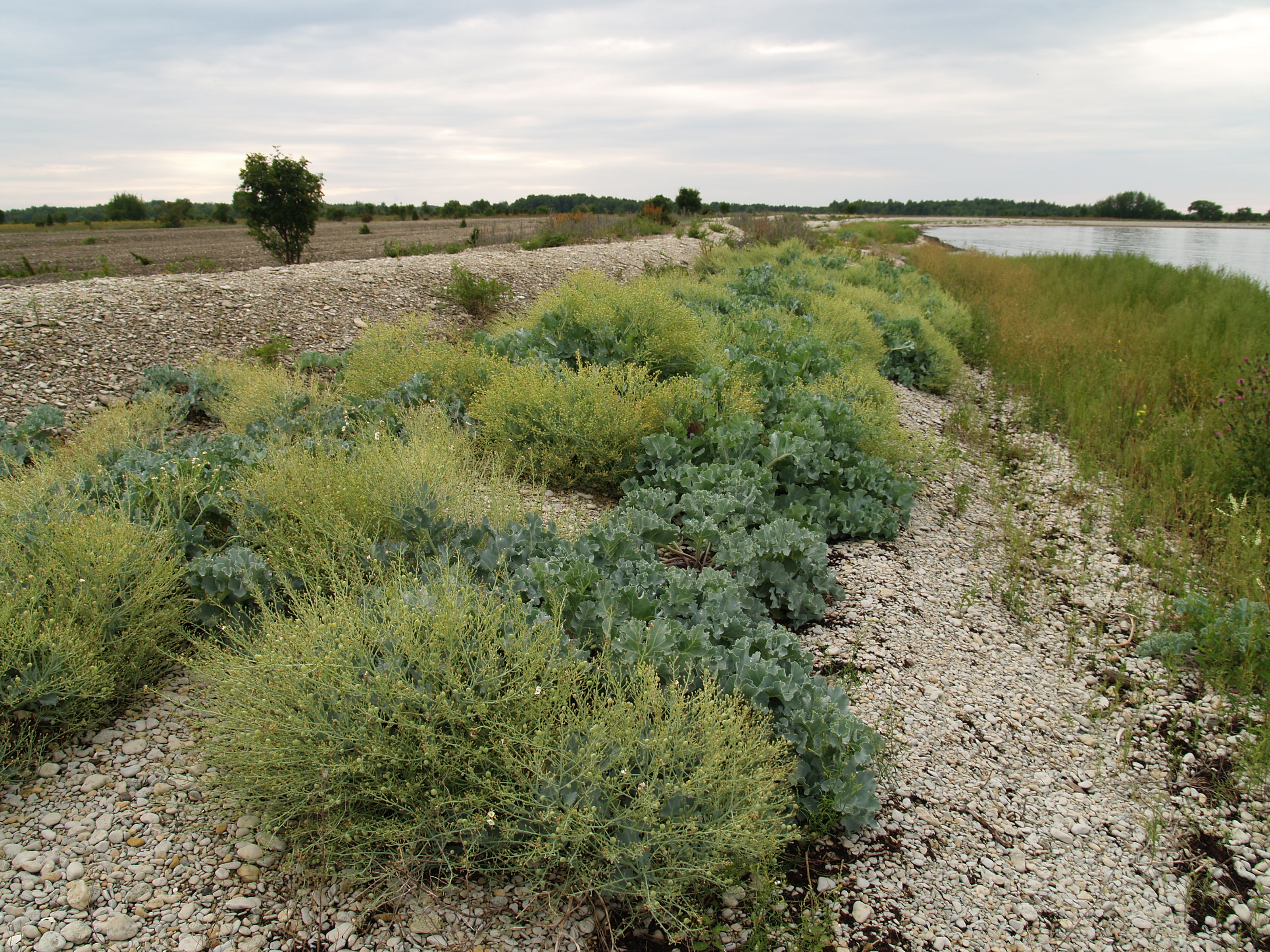 Merikapsas Pakri saartel